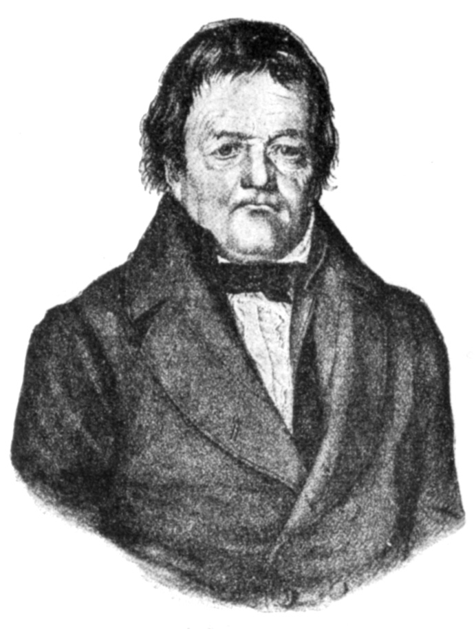 Samuel Friedrich Sauter, nach dem Titelbild seiner Gedicht-Gesamtausgabe von 1845